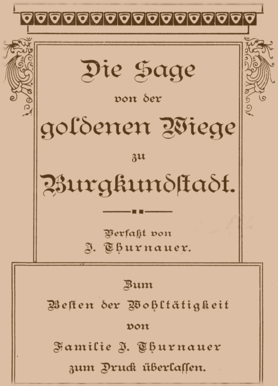 Deckblatt der von Isak Thurnauer verfasste Stadtsage der "Goldenen Wiege"